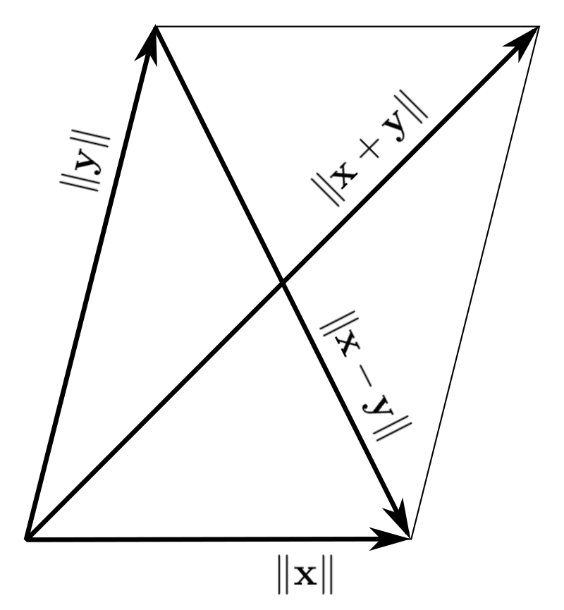 parallellogramlagen tillämpad på normer